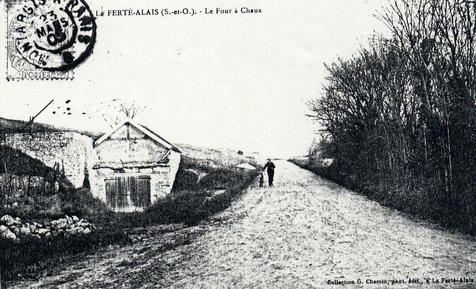 Four à chaux de la Ferté-Alais en 1905